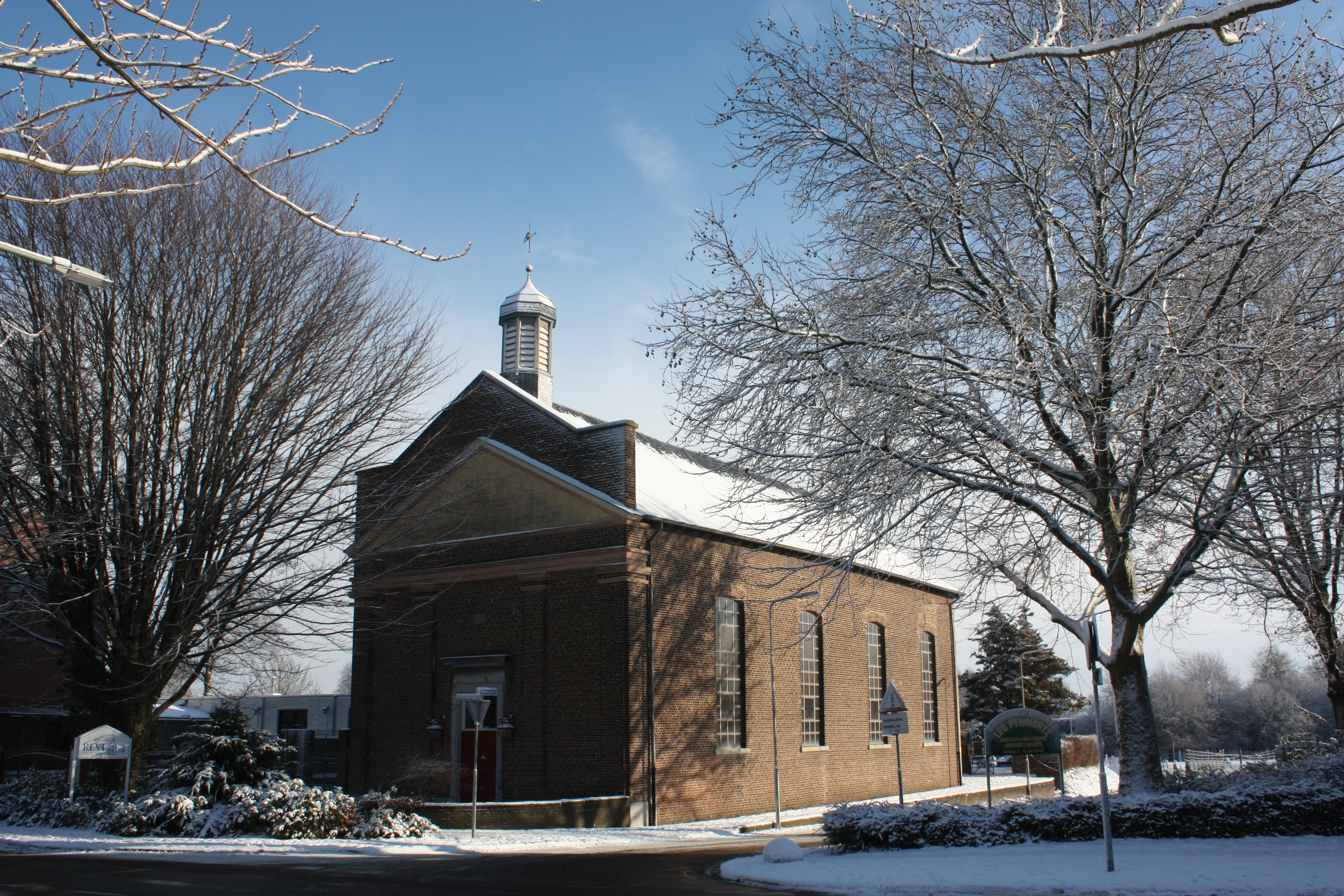 Sjpaans Kentje (Spaans Hoekje) Nieuwenhagen